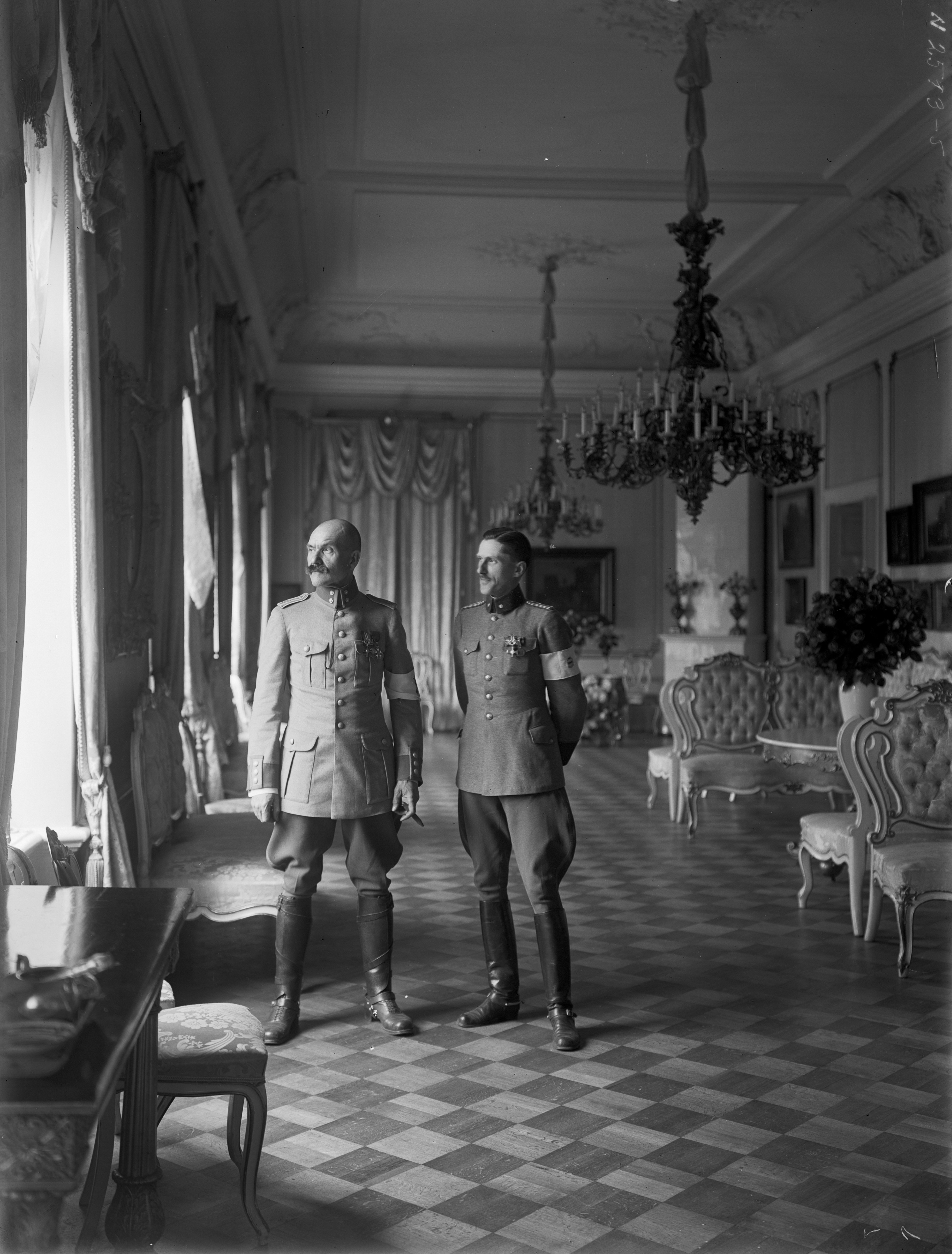 Atelier Eric Sundström: C. G. E. Mannerheim's adjutants Akseli Gallen-Kallela and ensign John Rosenbröijer, 1918-1919, Helsinki. Digitized original negative. / Mannerheimin adjutantit Akseli Gallen-Kallela ja vänriikki John Rosenbröijer 1918-1919, Helsinki. Digitoitu alkuperäisestä negatiivista. The Finnish Museum of Photography / Suomen valokuvataiteen museo